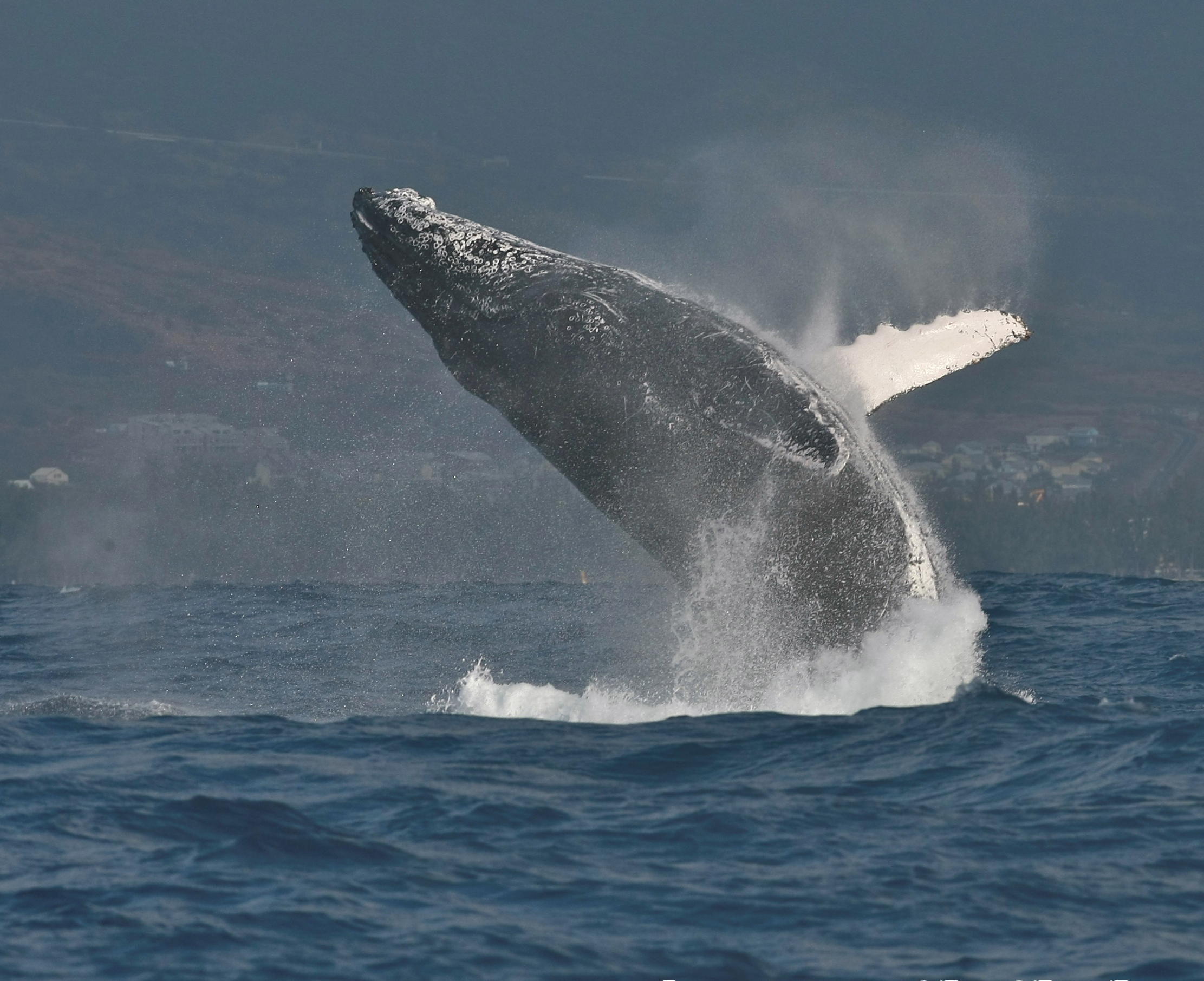 Saut de baleine à bosse dans la baie de St Gilles de la Réunion.